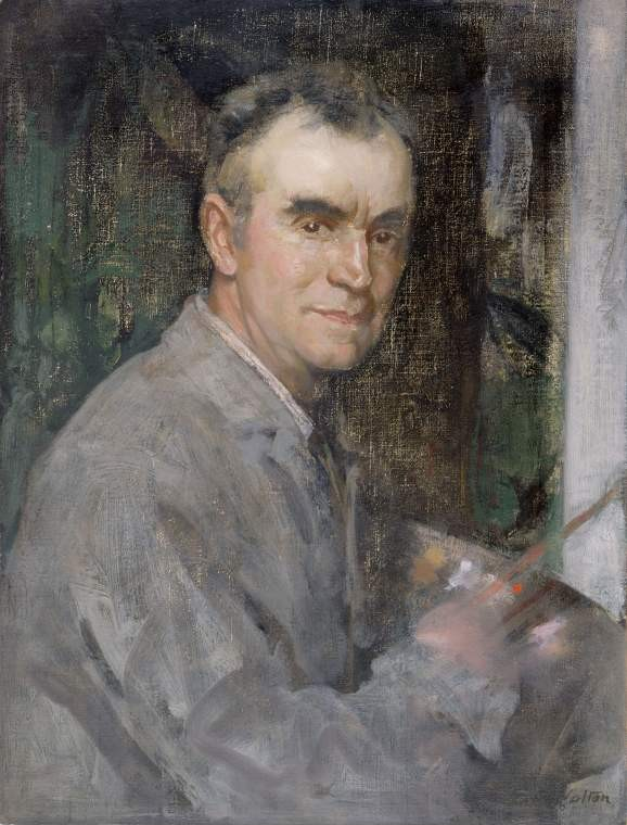 Self-portrait